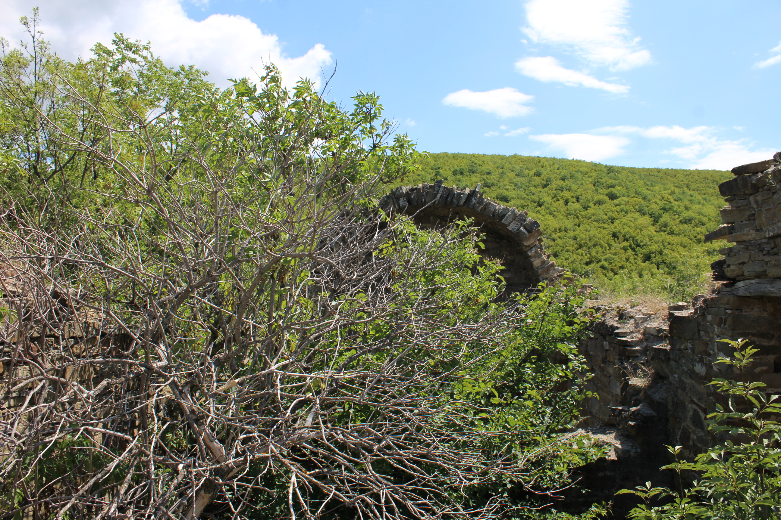 Ujemire